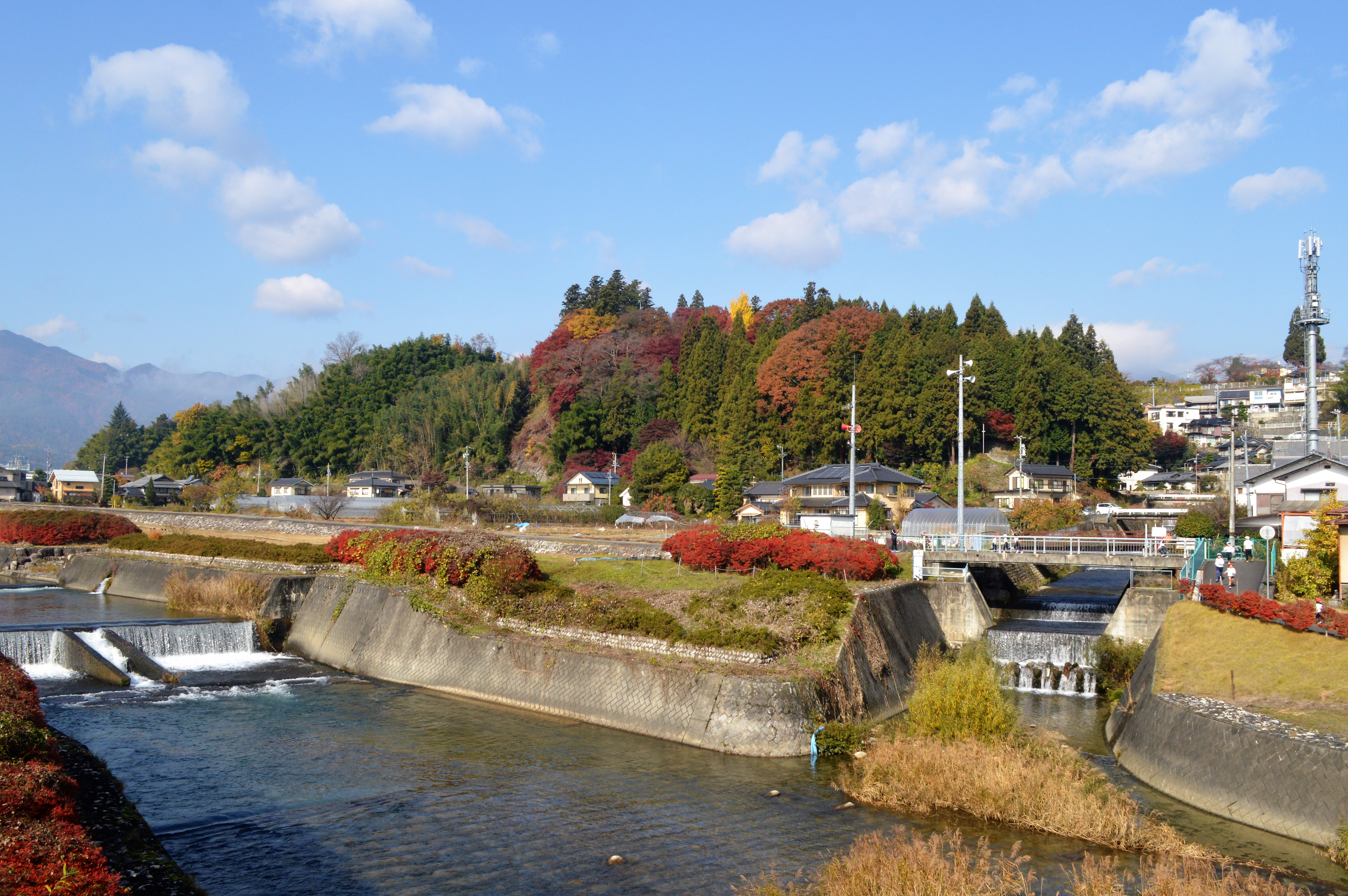 長野県飯田市を流れる松川。鼎橋南側から北西を向いて撮影。画面右から合流しているのは源長沢。中央のこんもりとした森は愛宕稲荷神社。